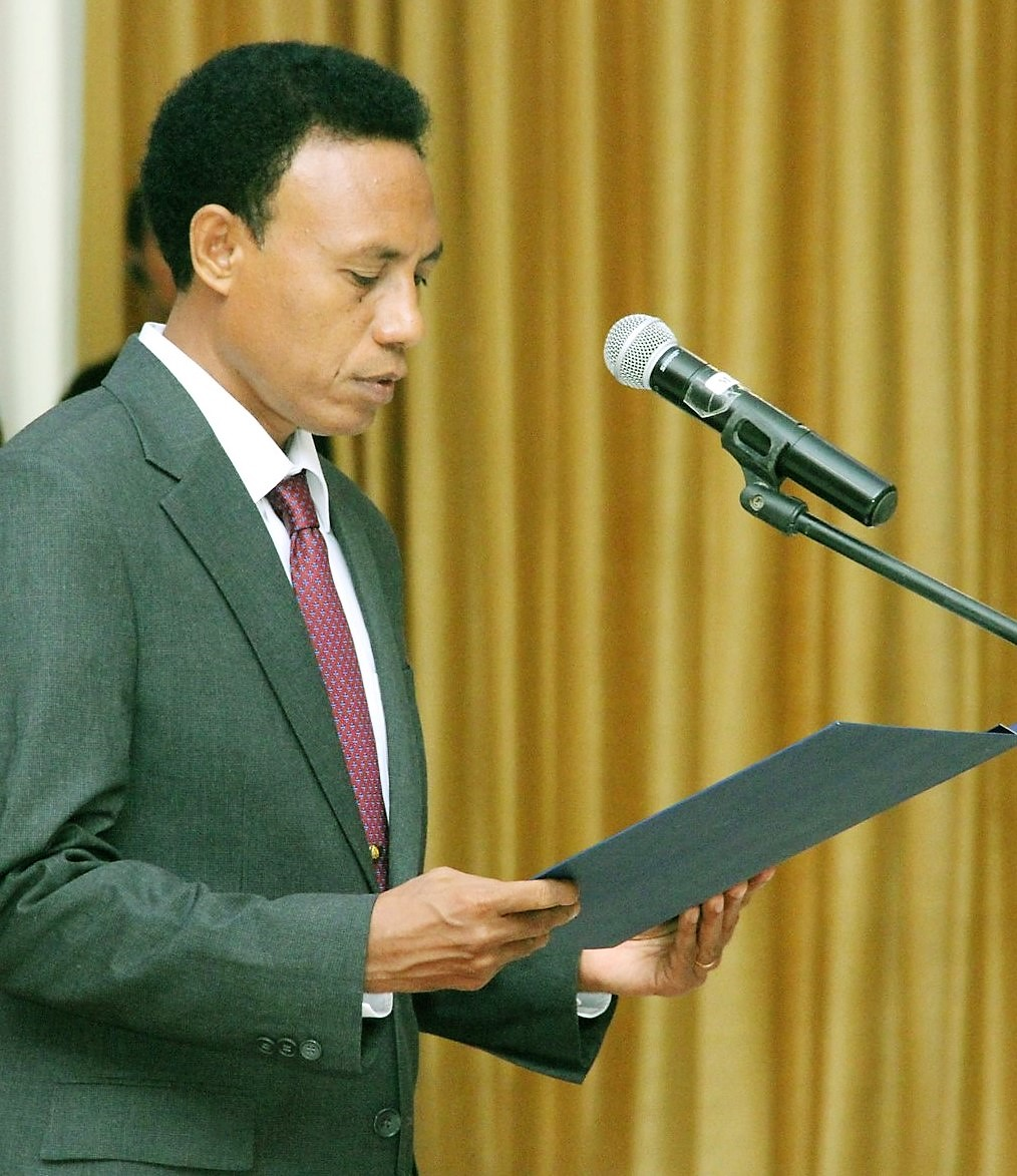 Joaquim Amaral, osttimoresischer Botschafter in Thailand erhält seine Akkreditierung von Präsident Taur Matan Ruak